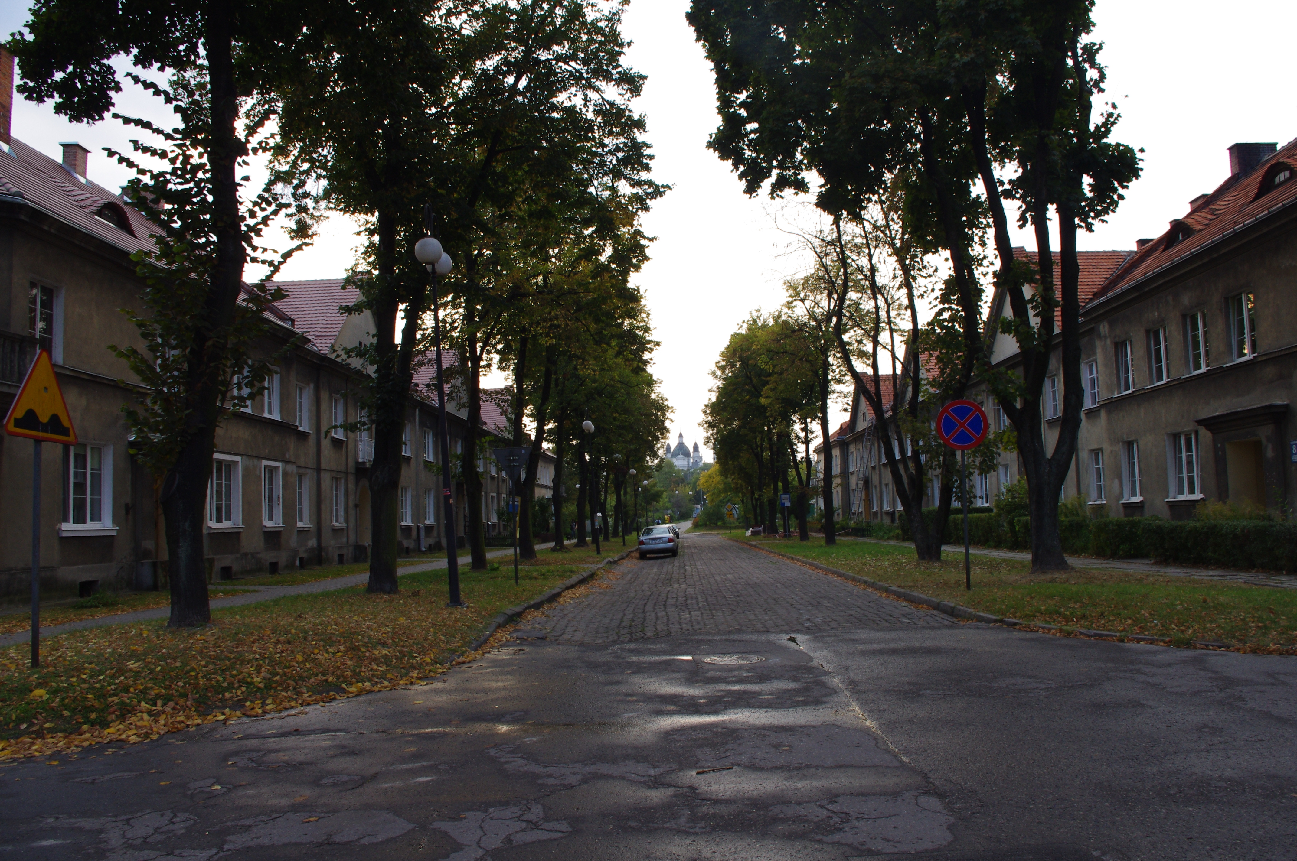 Chełm - ul. Katedralna - główna oś kompozycji dzielnicy Nowe Miasto z 1926 r., między Górką Katedralną i Wzgórzem Kredowym, założonej w dwudziestoleciu miedzywonnym w związku z zamiarem przeniesienia z Radomia do Chełmia Wschodniej Okręgowej Dyrekcji "Polskich Kolei Państwowych".